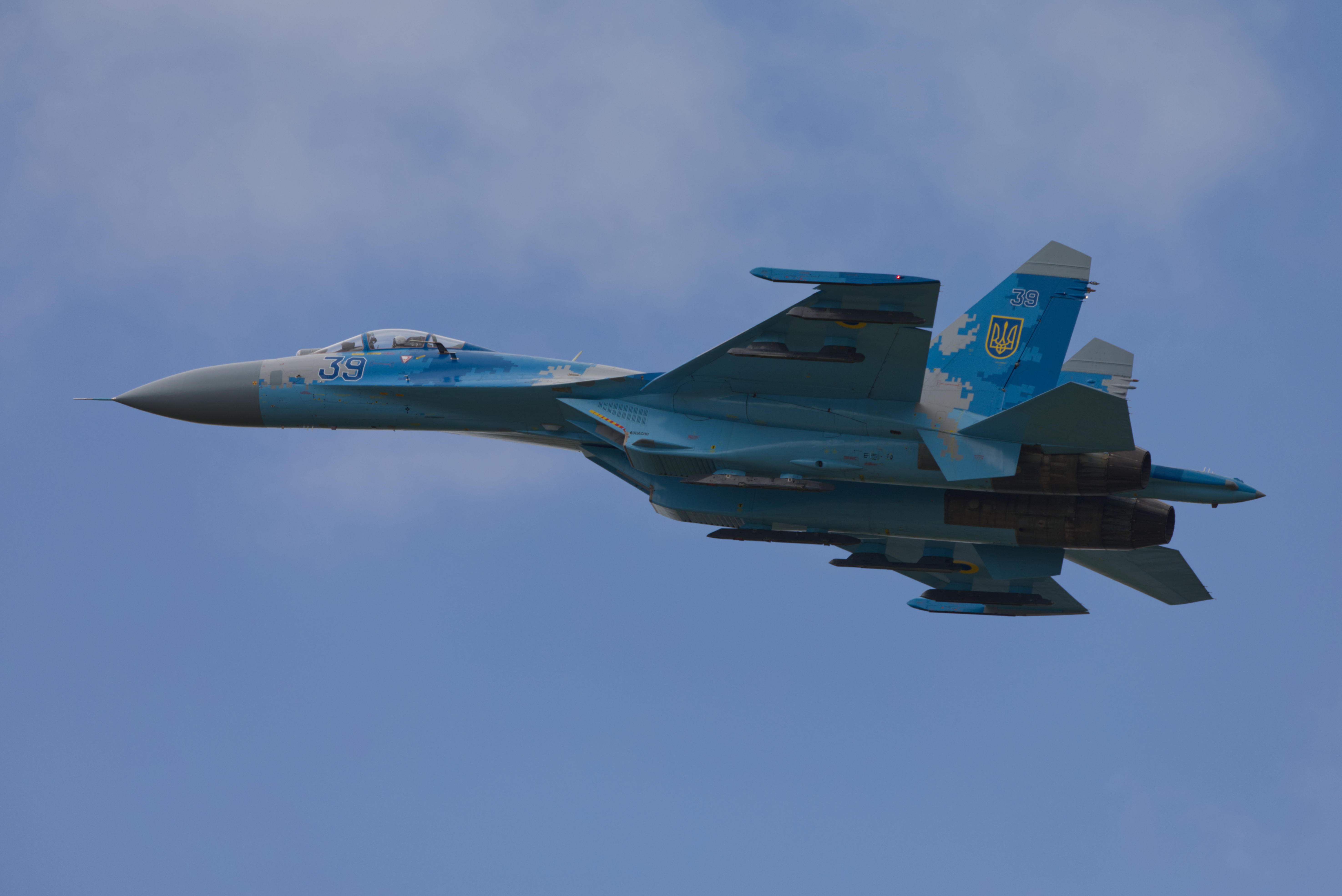 Sukhoi Su-27P 5D4_3624